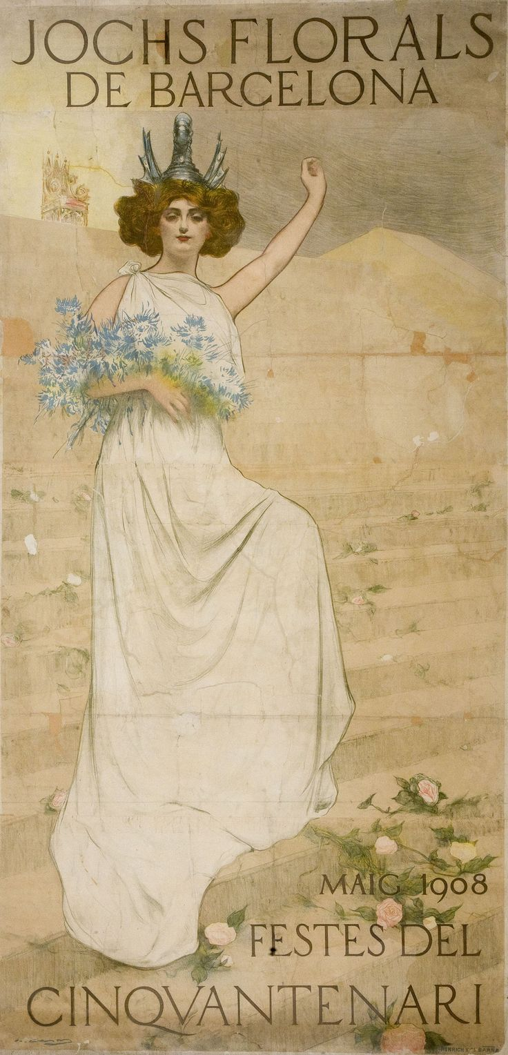 Cartel del cincuentenario de los Juegos Florales (1908).